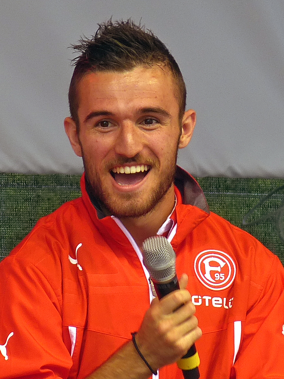 Giannis Gianniotas, griechischer Fußballspieler